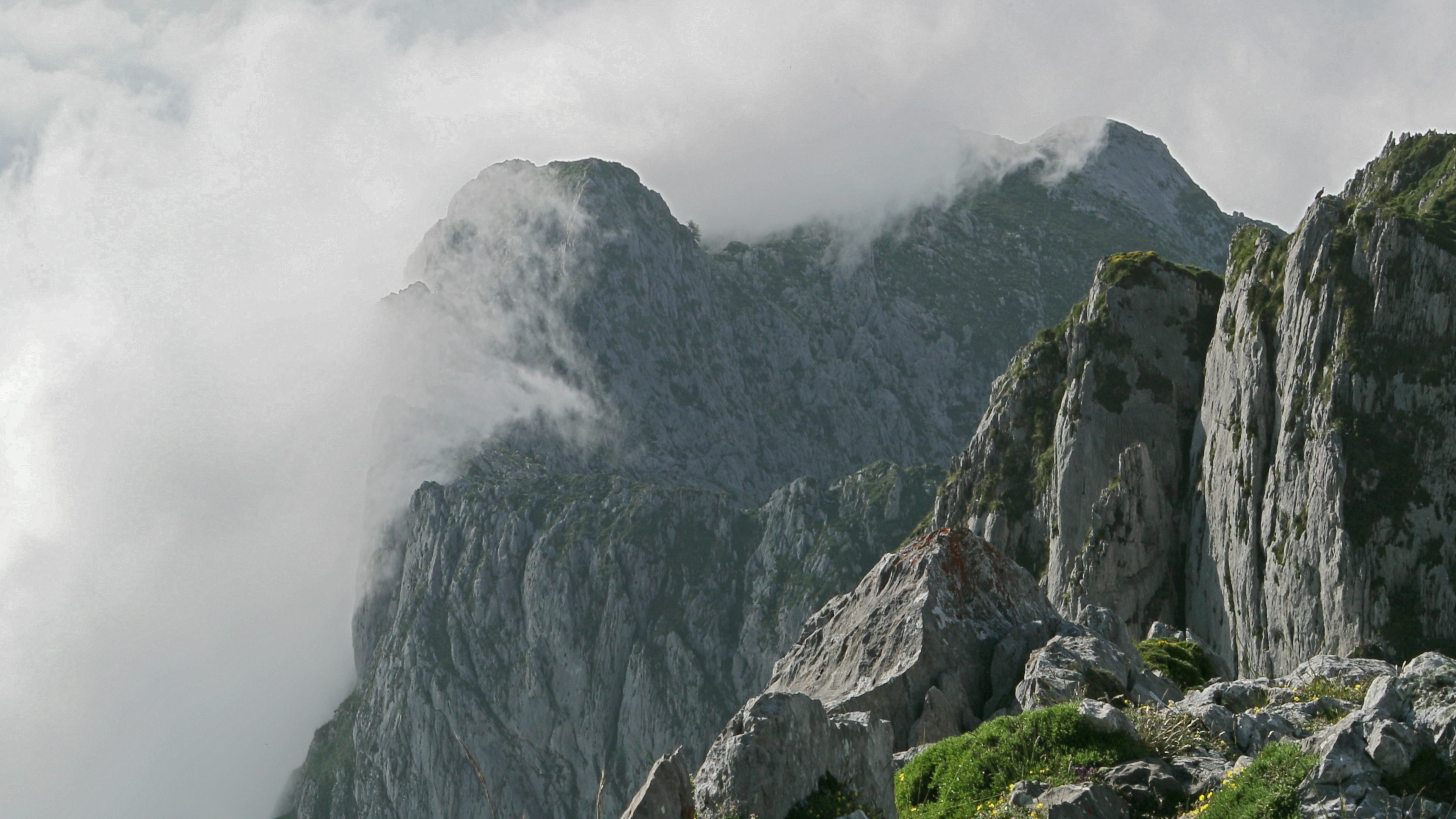 Vista desde Ordiales